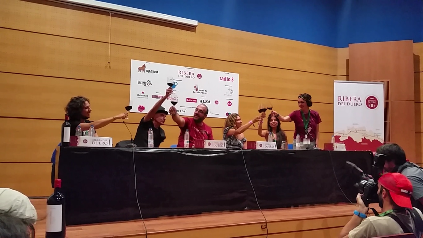 Rueda de Prensa el Jueves 13 Agosto de 2015, durante el Festival Sonorama, para el homenaje a Enrique Morente: "Morente Vive!". De izquierda a derecha, José Enrique Morente, Antonio Arias, Javier Ajenjo (director del festival), Estrella Morente, Soleá Morente y Sandra González (coordinadora del festival). Recinto ferial, Aranda de Duero, Burgos, España.